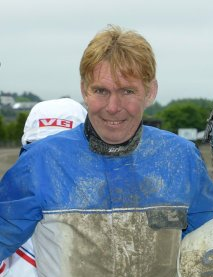 Turno di azzurra pris